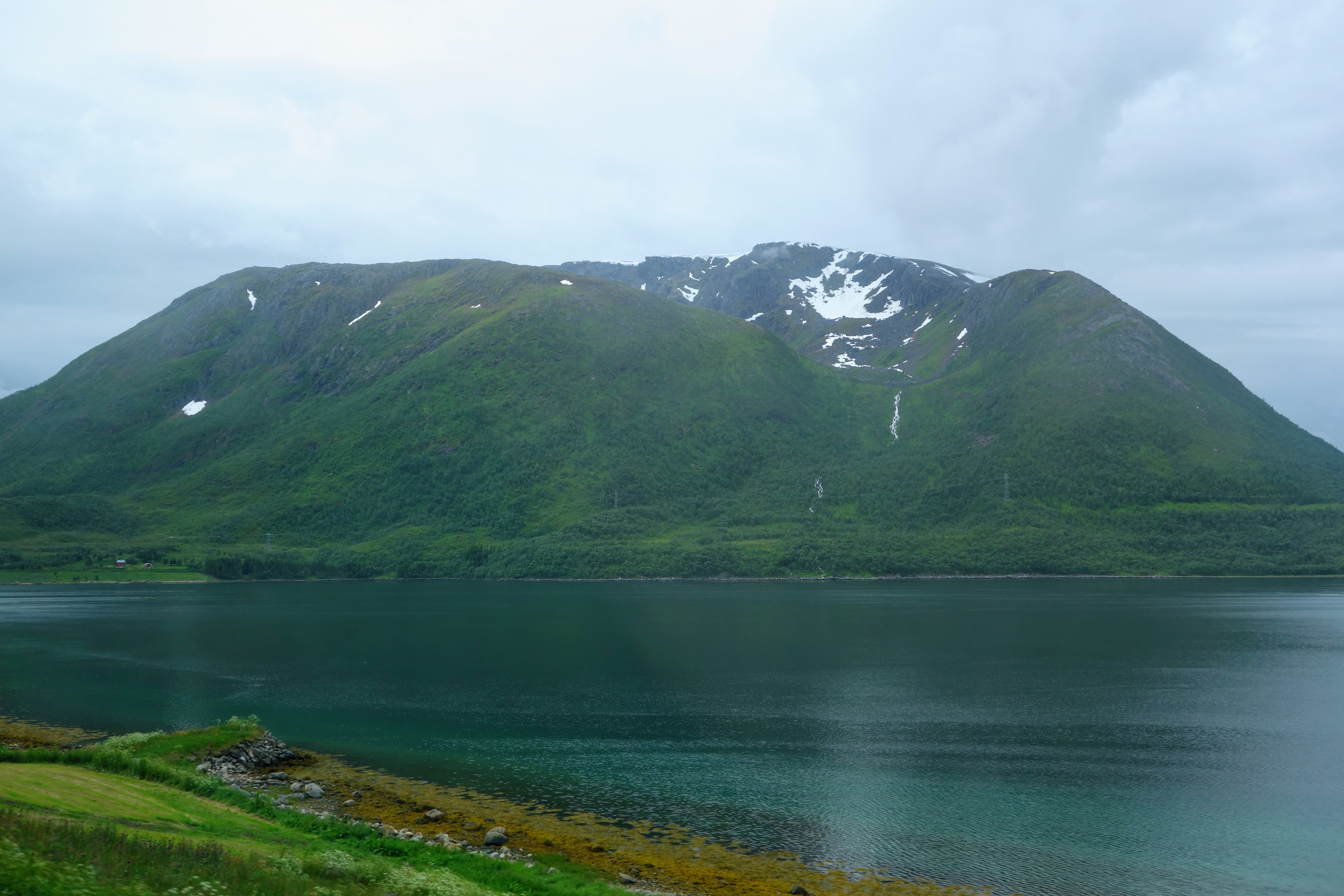 Reinfjellet i Kvæfjord, 907 moh., sett fra Refsnes. Austerfjorden i forgrunnen.